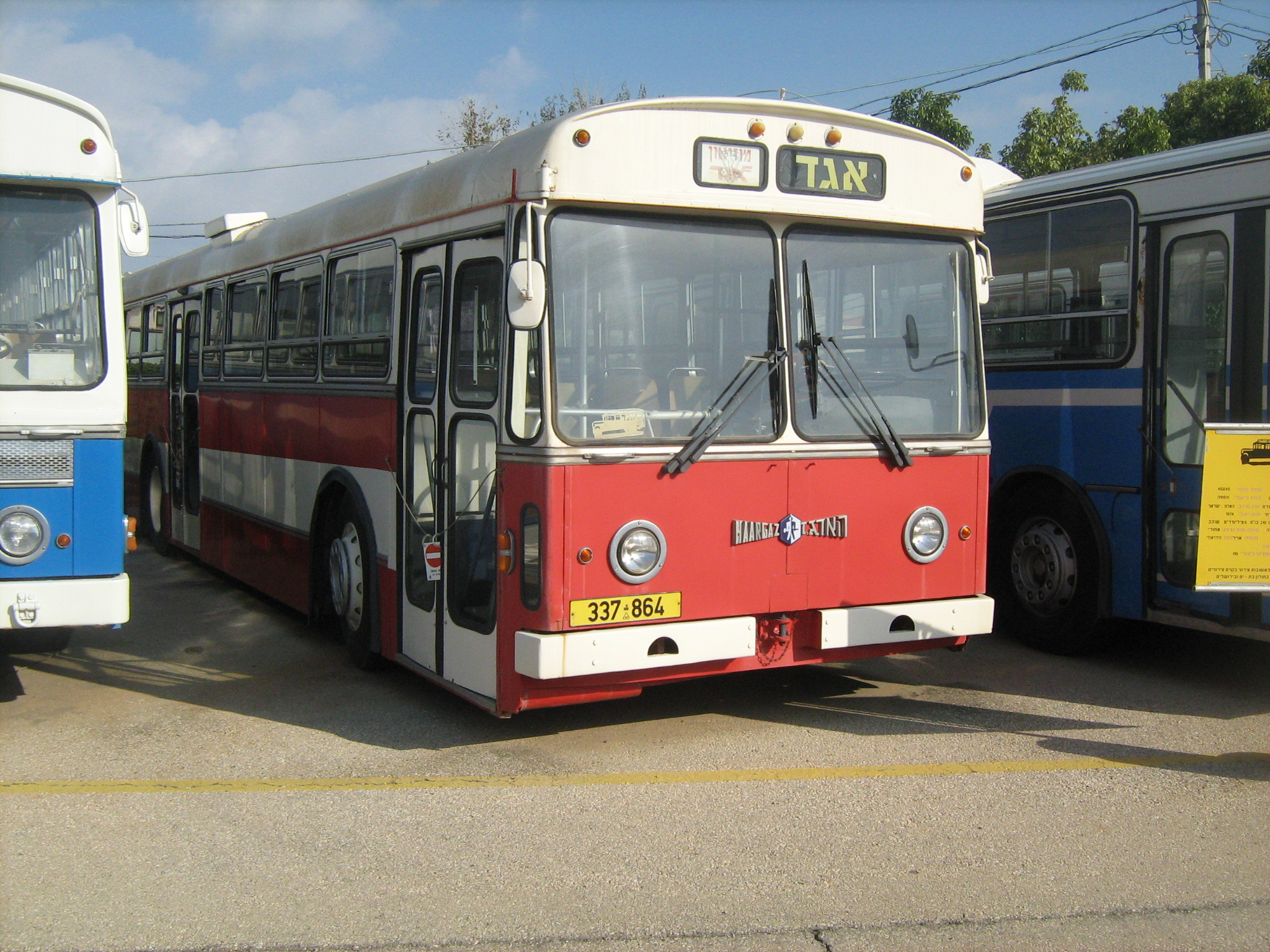 מוזיאון אגד בחולון